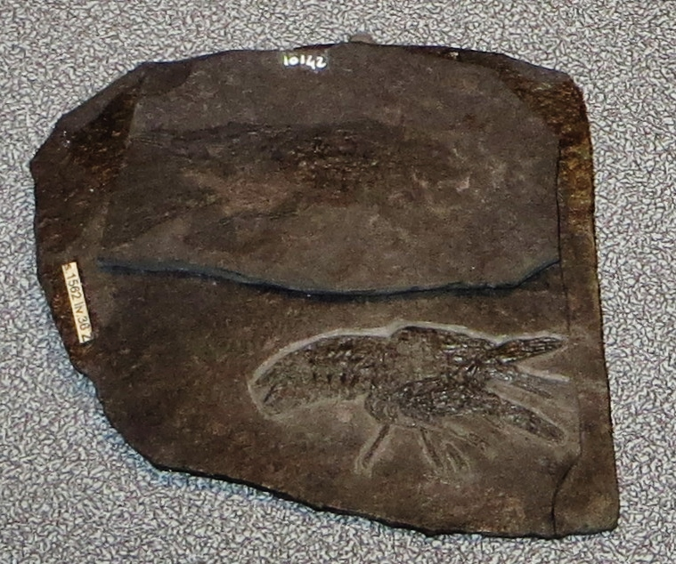 Fossil of Longichela, an extinct crustacea- Took the picture at Museo di Scienze Naturali, Bergamo